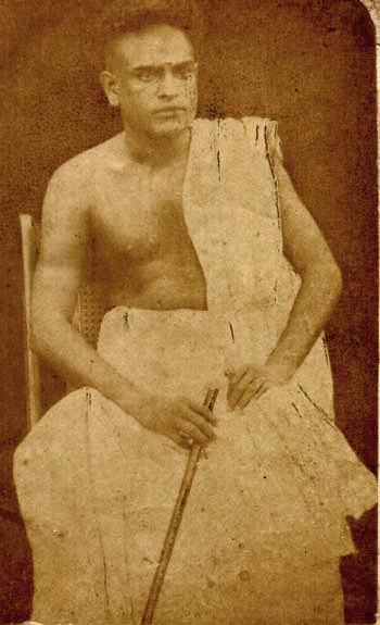 CV as a young man